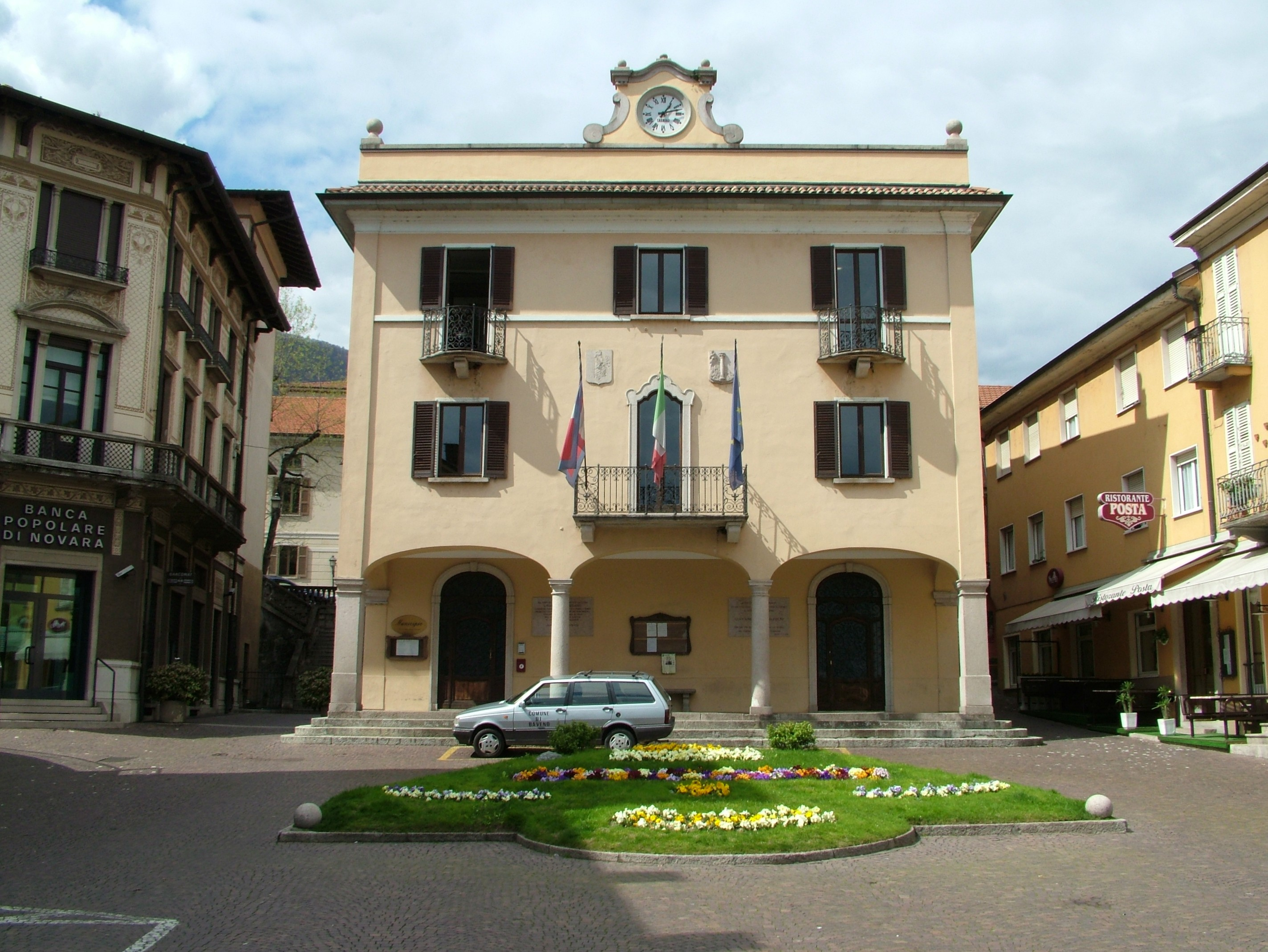 Baveno, Region Piemont, die Gemeindeverwaltung